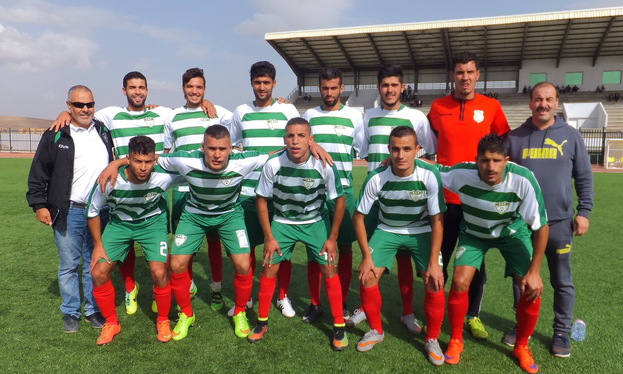 صورة لـ تشكيلة الملعب الإفريقي السطايفي